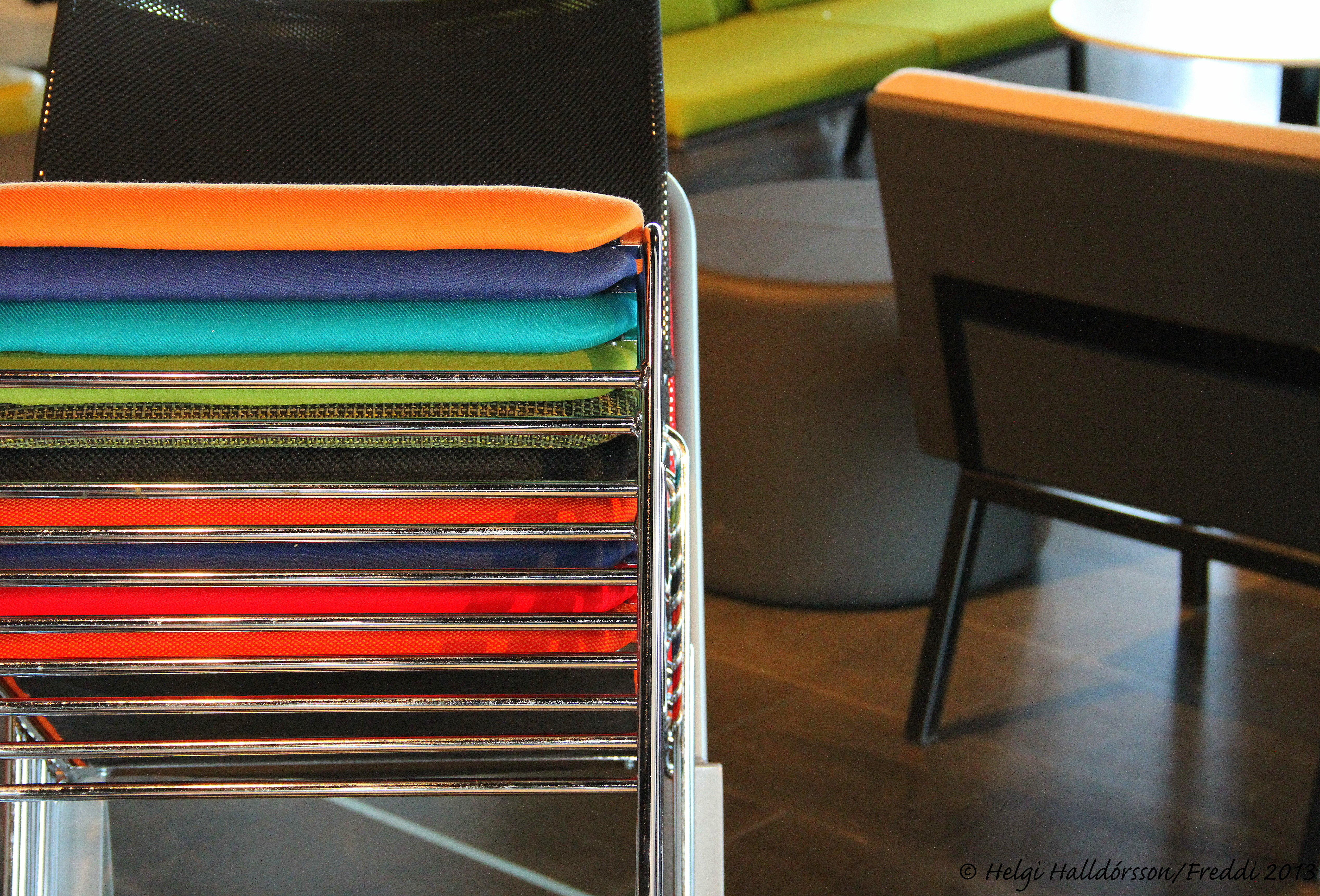 Icelandic design